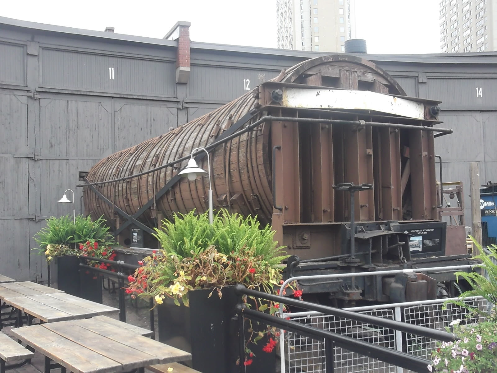 Wooden vinegar car